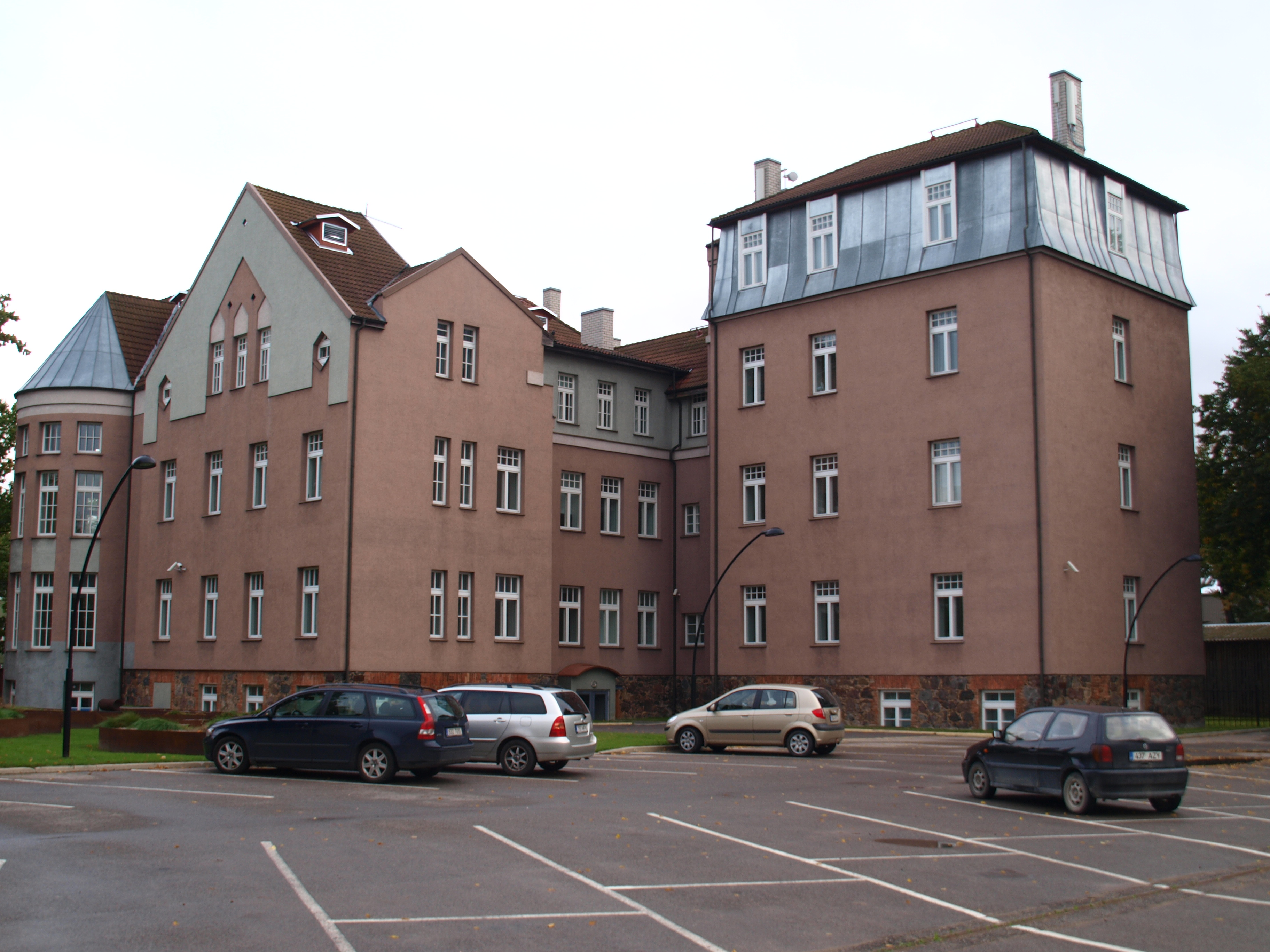 Endine Rostostsevi eraülikooli hoone. Tänapäeval Tartu Ülikooli Juridicum